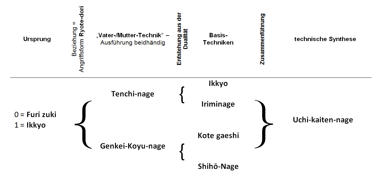 Stammbaum Aikido-Basistechniken nach M. Ikeda